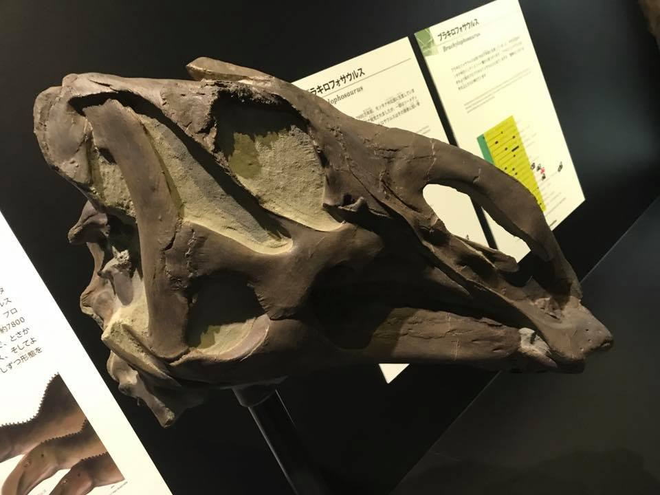 プロブラキロフォサウルス